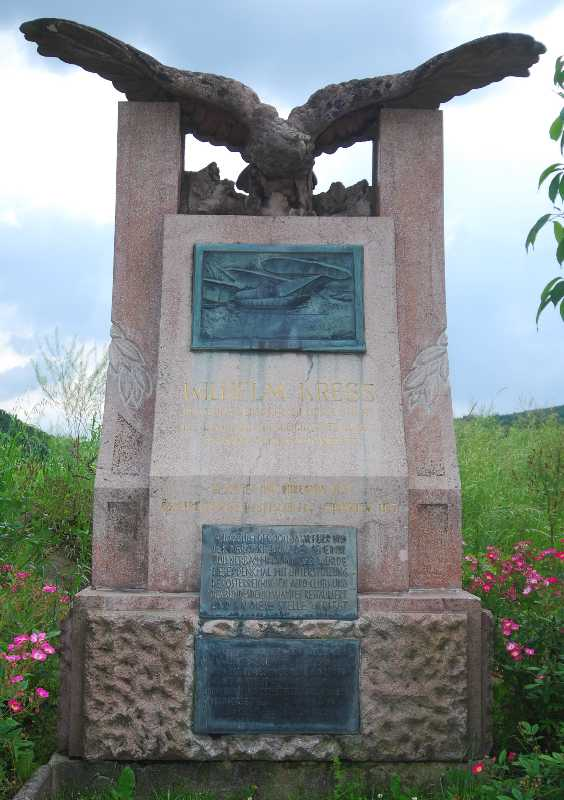 Denkmal für den österreichischen Flugpionier Wilhelm Kress, der auf dem Wienerwaldsee mit einem Wasserflugzeug einen Flugversuch unternehmen wollte und dabei scheiterte